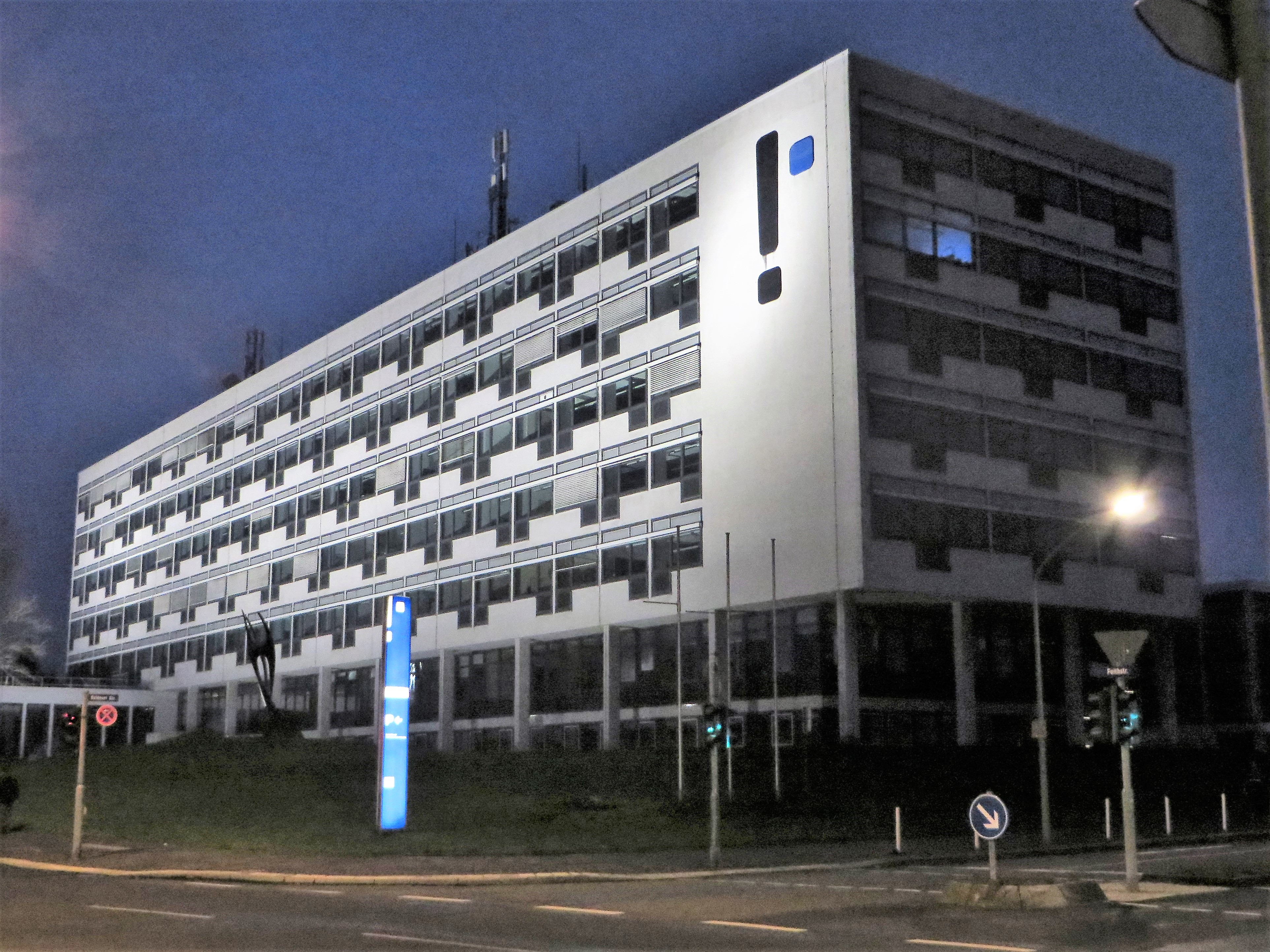 Fachhochschule Südwestfalen Standort Hagen in abendlicher Beleuchtung. Blick von der Kreuzung Feithstraße/Haldener Straße auf die Nordostseite.